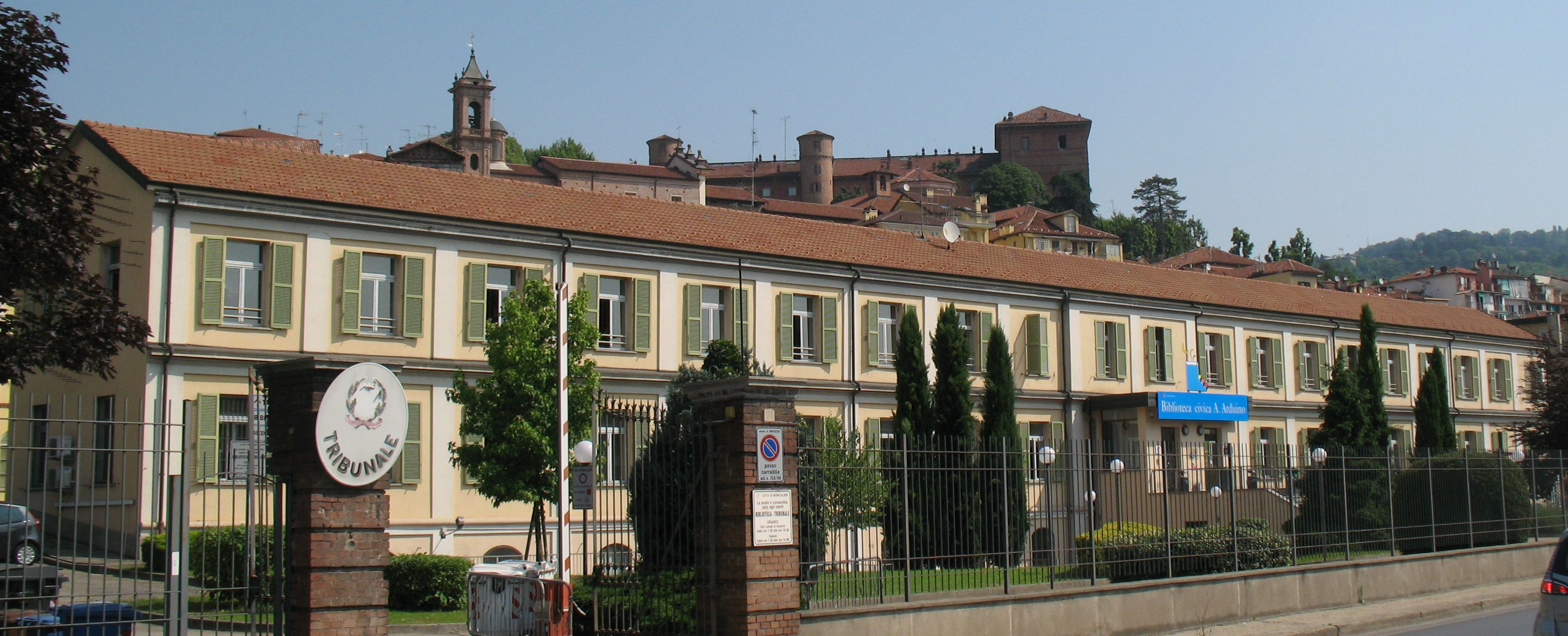 Edificio ex-SAFFA, sede della biblioteca civica Antonio Arduino a Moncalieri.